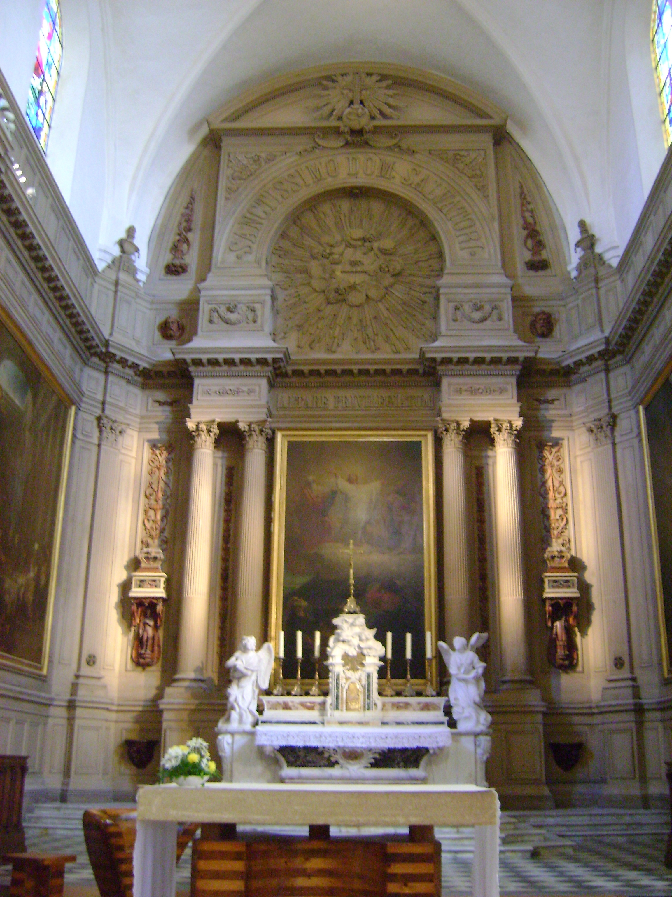 Eglise Saint-Sauveur de la Rochelle.